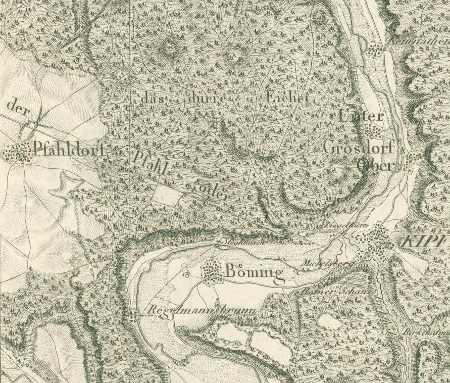 Ausschnitt aus dem 1817 entstandenen Blatt Dietfurt der Loseblattsammlung „Topographischer Atlas vom Königreiche Baiern“.